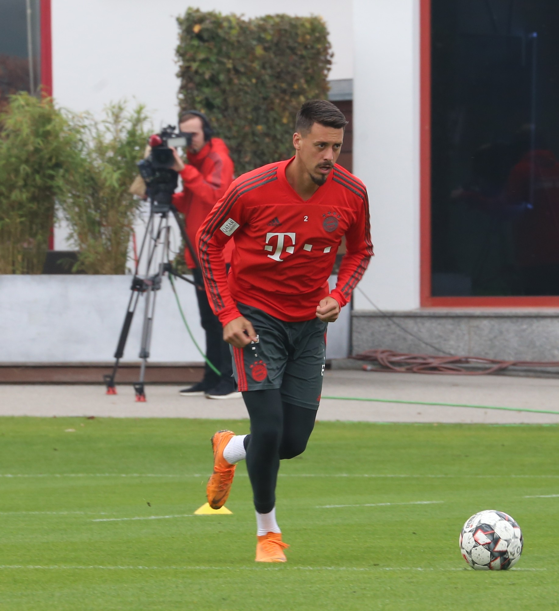 Sandro Wagner, am 9. Oktober 2018 beim Training auf dem Gelände des FC Bayern München